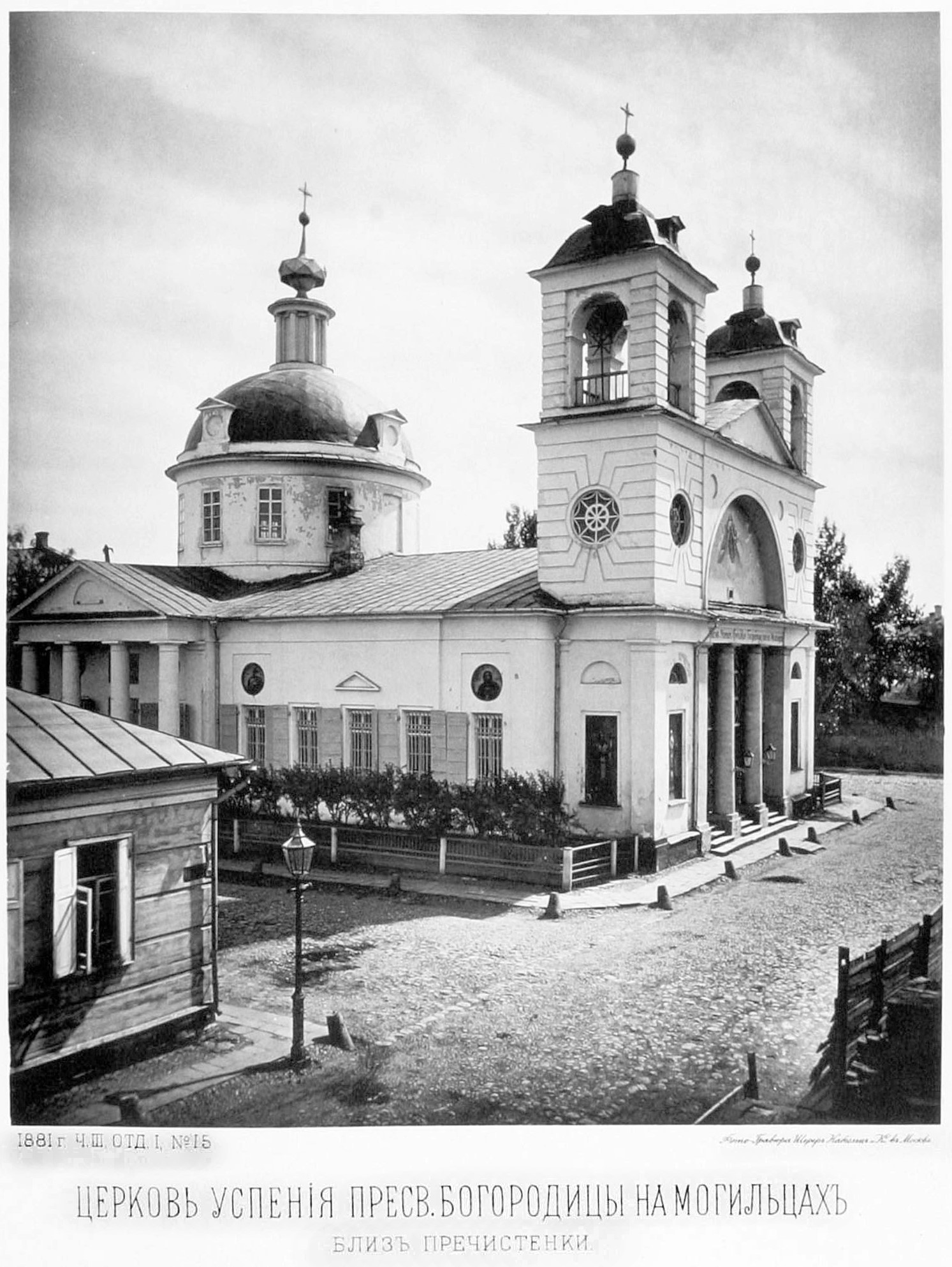 Церковь Успения на могильцах 1881г. Н. А. Найдёнов «Москва. Соборы, монастыри и церкви»